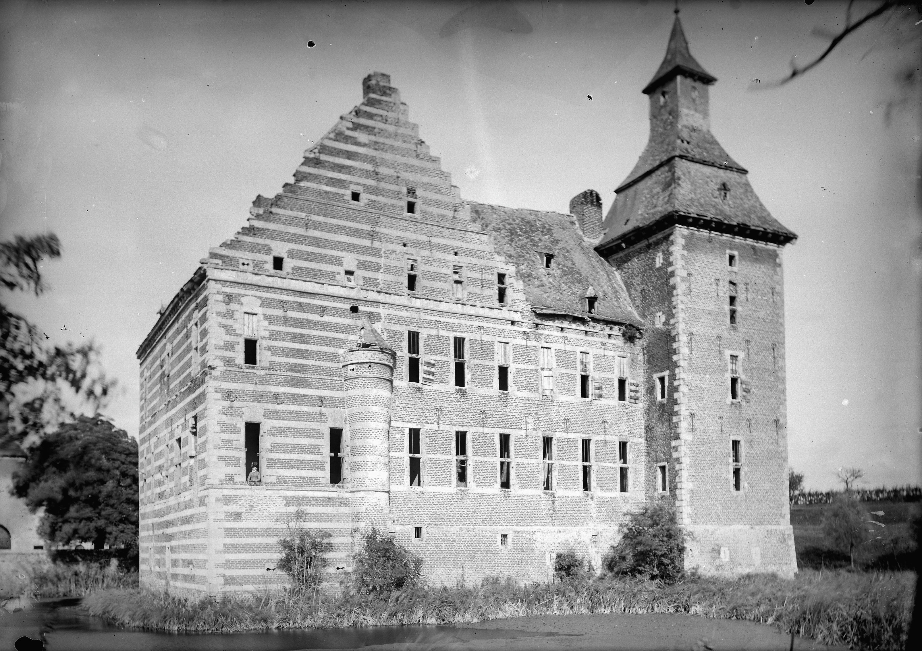 Kasteel: kasteel (opmerking: Fotonummer 6405)